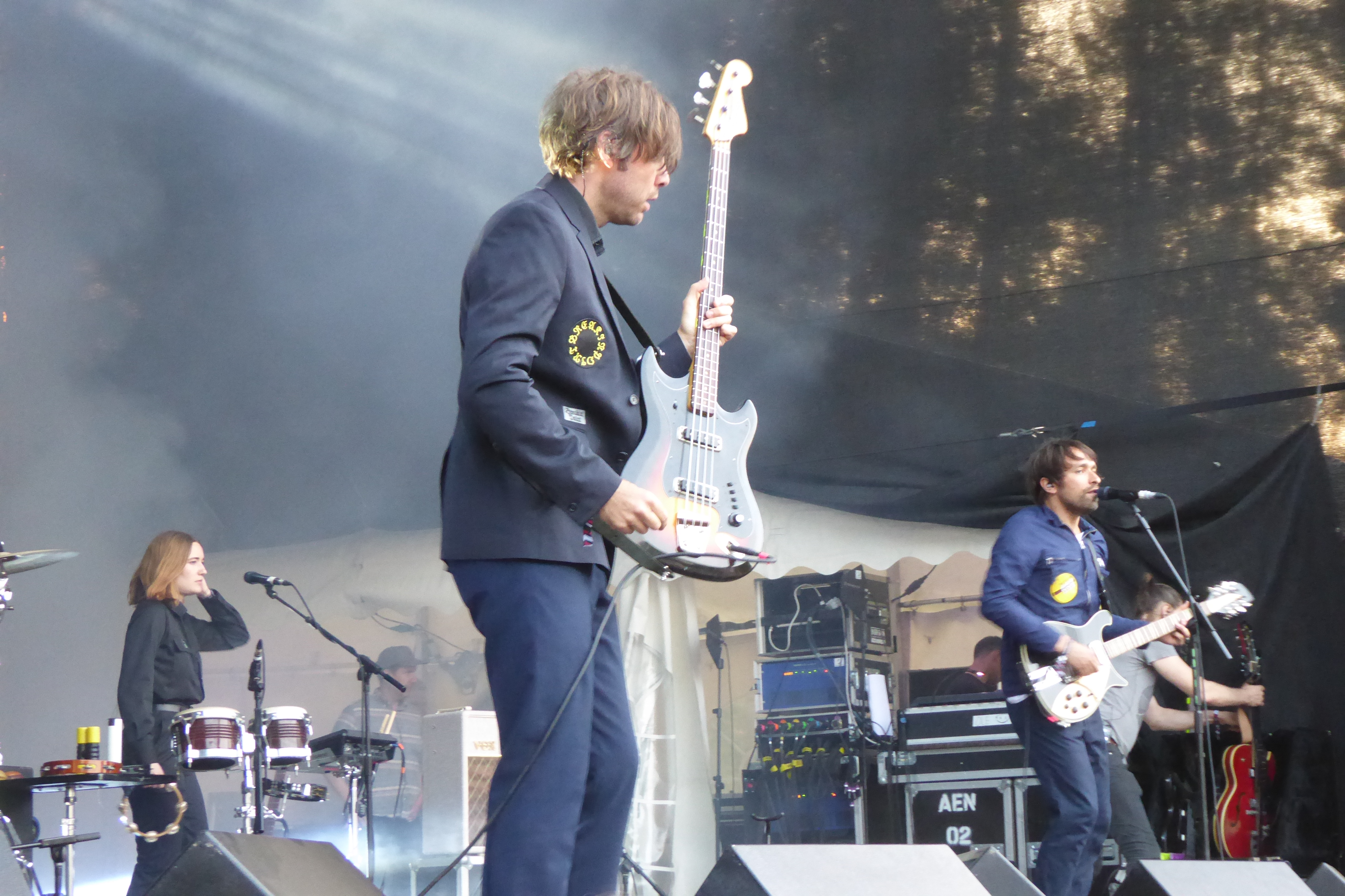 Peter Bjorn and John auf dem Immergut Festival 2016